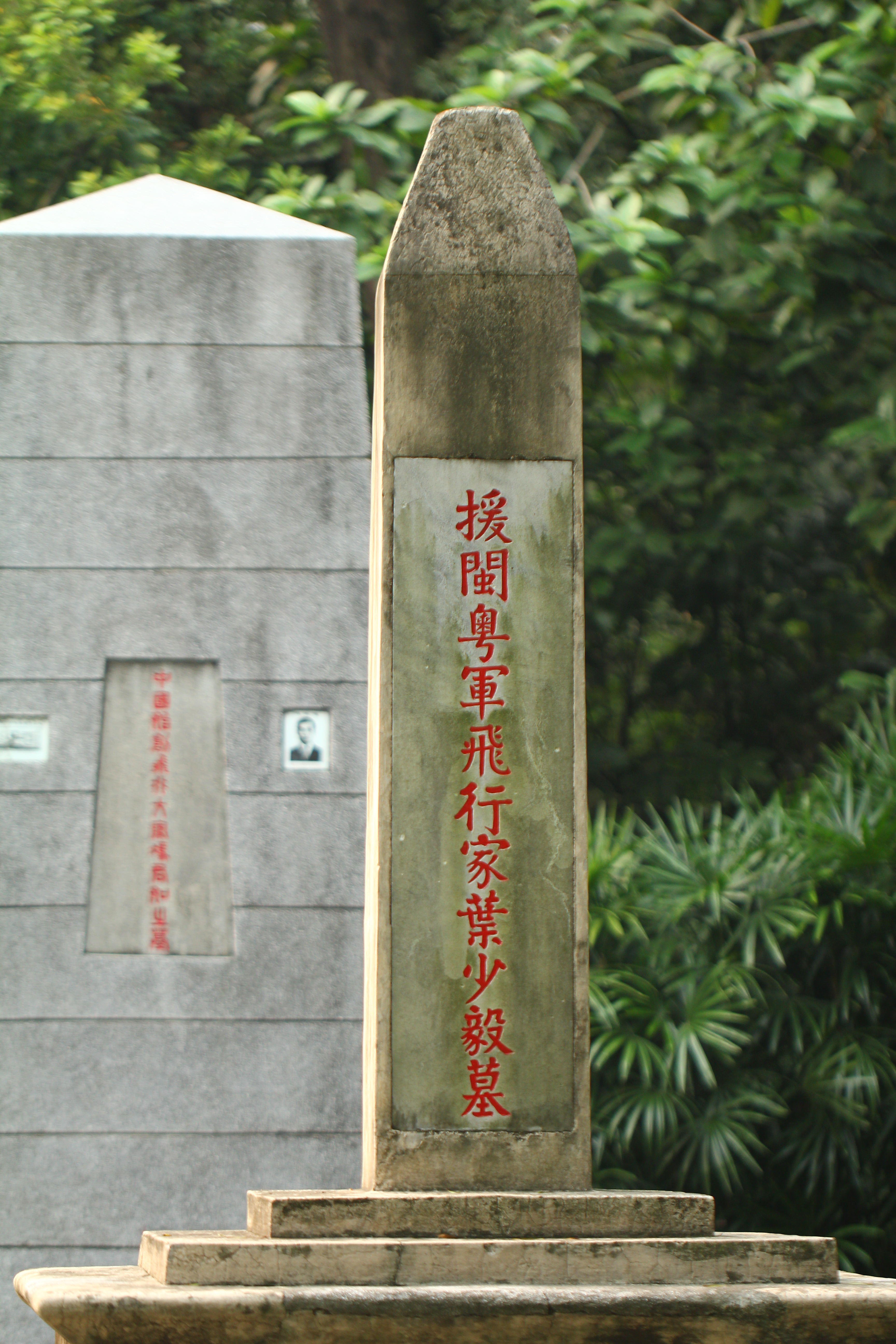 援閩粵軍總司令陳炯明立於黃花崗。